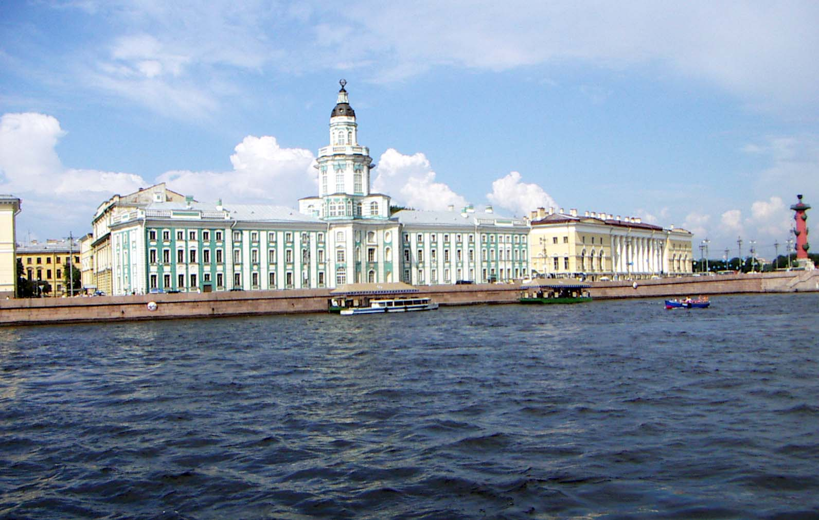 Sergey Barichev